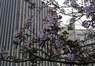 Paulownia tomentosa